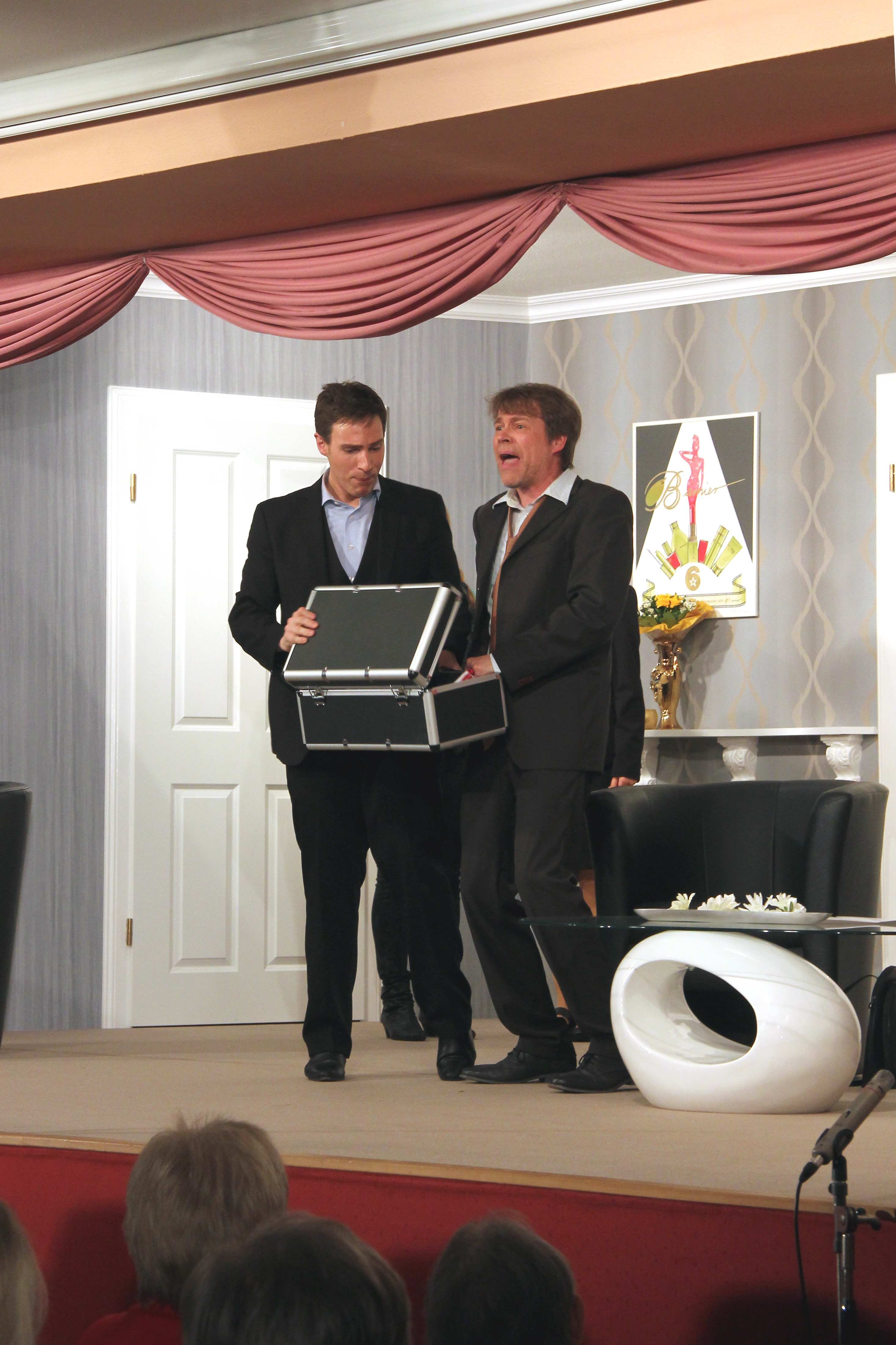 „Oscar“ von Claude Magnier; Aufführung der Kolping-Theatergruppe Kärlich, Mülheim-Kärlich. Schlussszene: Auch jetzt ist es nicht der richtige Koffer